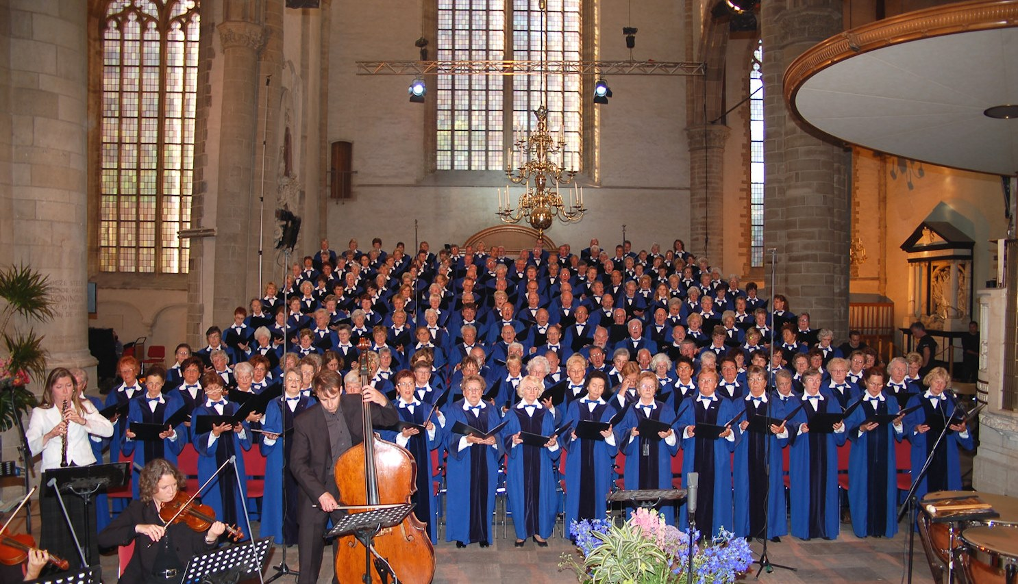 Deo Cantemus uit Rotterdam zingt in de Laurenskerk in Rotterdam tijdens een televisieopname van Nederland Zingt door de E.O.